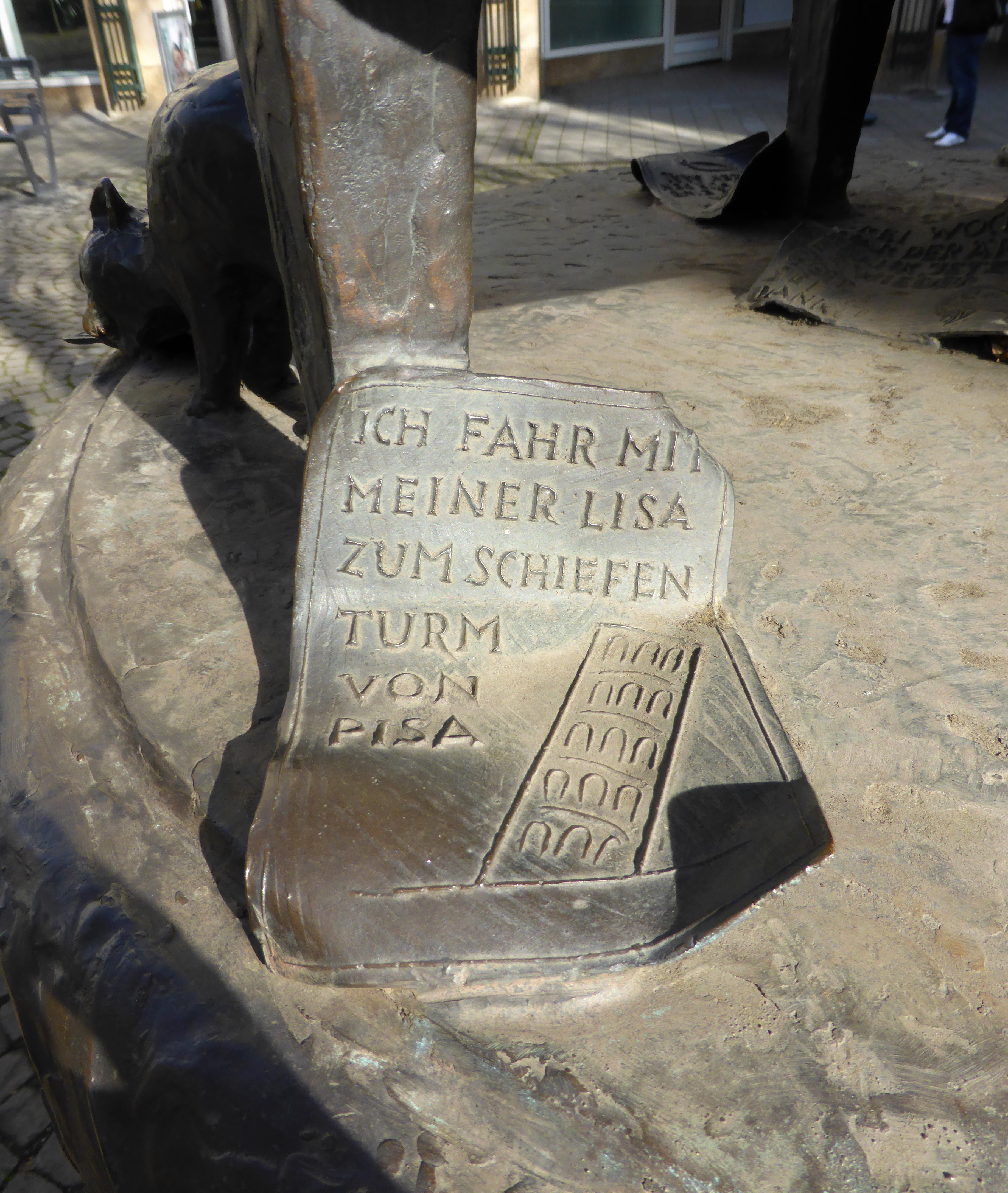 Jupp Schmitz-Denkmal, Salomonsgasse, Köln.